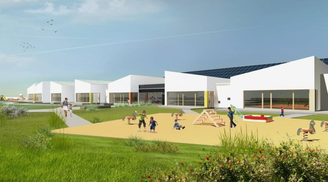 Nowo budowane przedszkole i żłobek w Kłodawie - wizualizacja